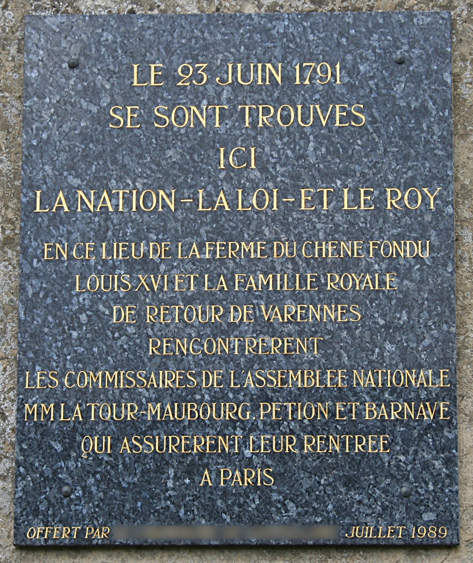 Plaque commémorative de la rencontre des représentants de l'Assemblée Nationale et de Louis XVI et sa famille, lors du retour de Varennes: Le 23 juin 1791 se sont trouvés ici La Nation - La Loi - Et Le ROY en ce lieu de la Ferme du Chêne fondu Louis XVI et la Famille Royale de retour de Varennes rencontrèrent les commissaires de l'Assemblée nationale MM La Tour-Maubourg, Petion et Barnave qui assurèret leur rentrée à Paris. Offert par (illisible) Juillet 1989.